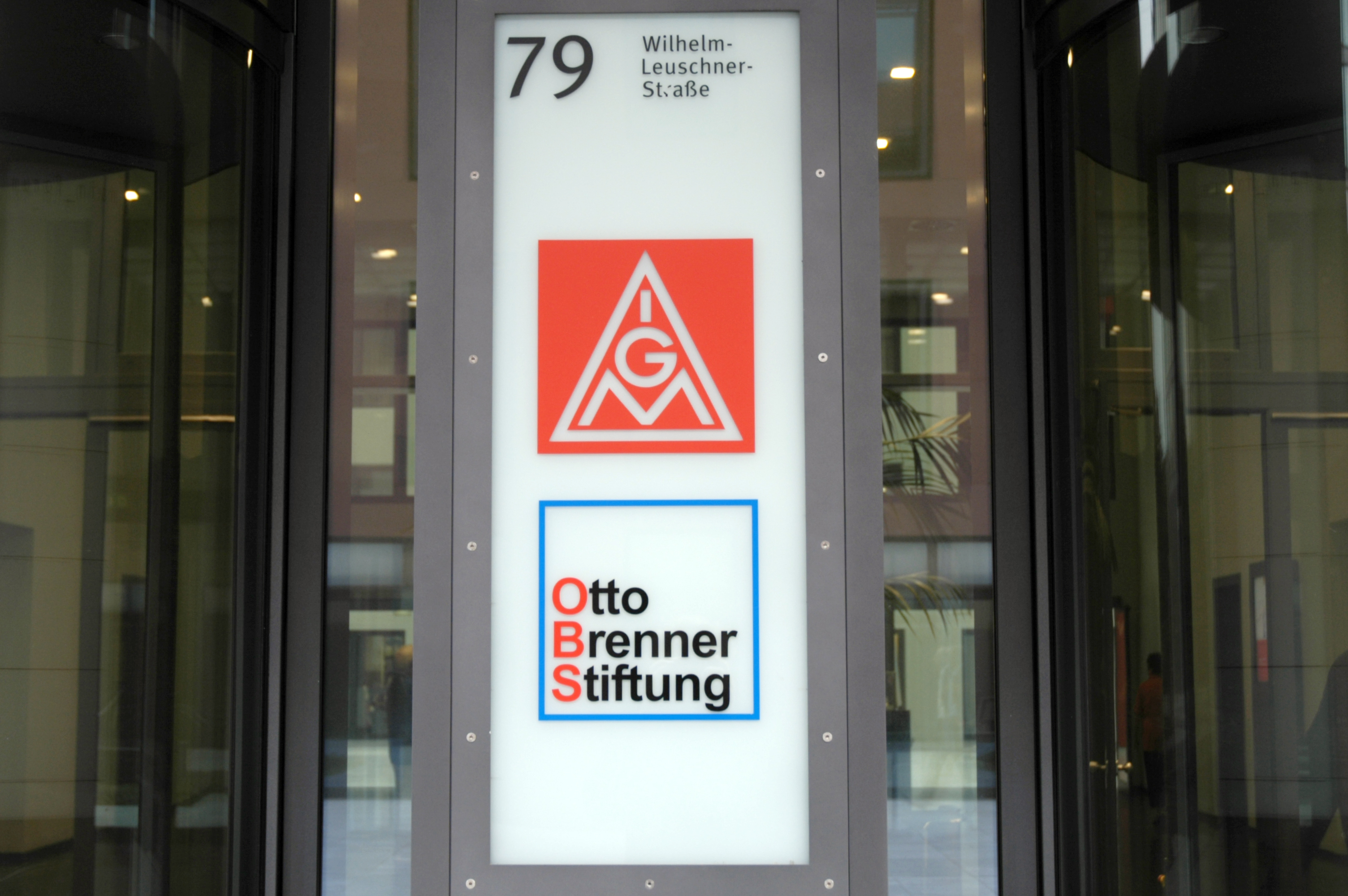 Eingangsbereich der Vorstandsverwaltung der IG Metall im MainForum, Frankfurt am Main